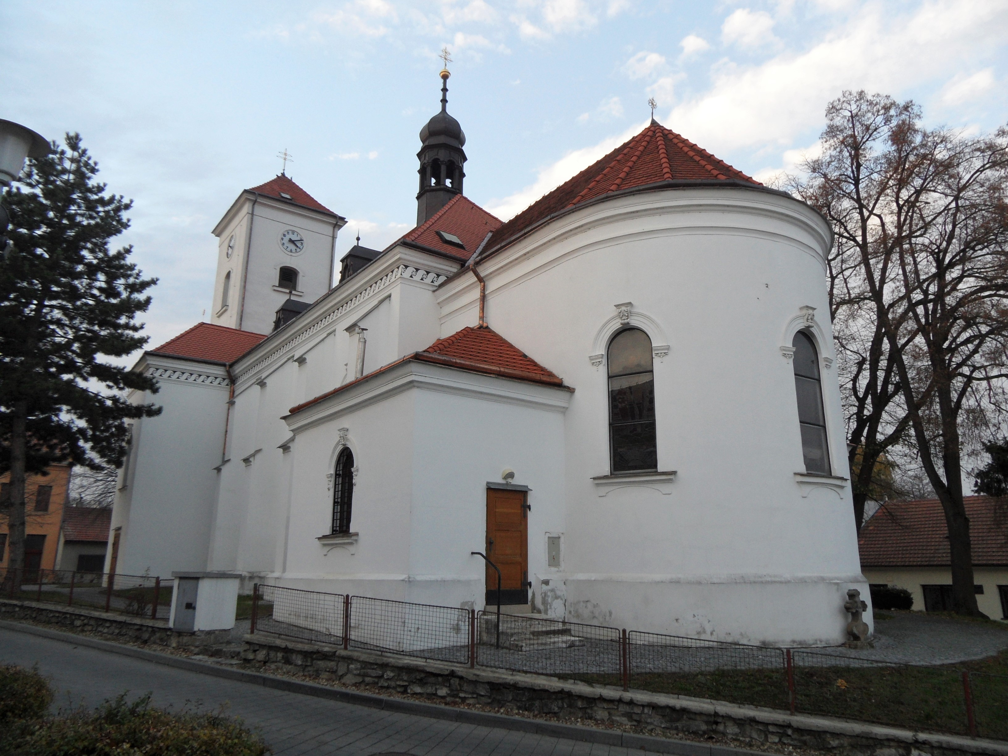 Kostel sv. Jiljí, Brno-Líšeň